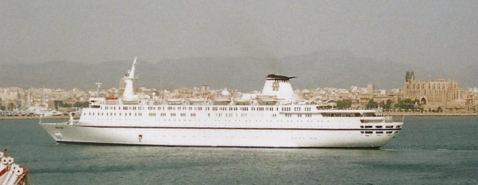 Palma de Mallorca Balearen